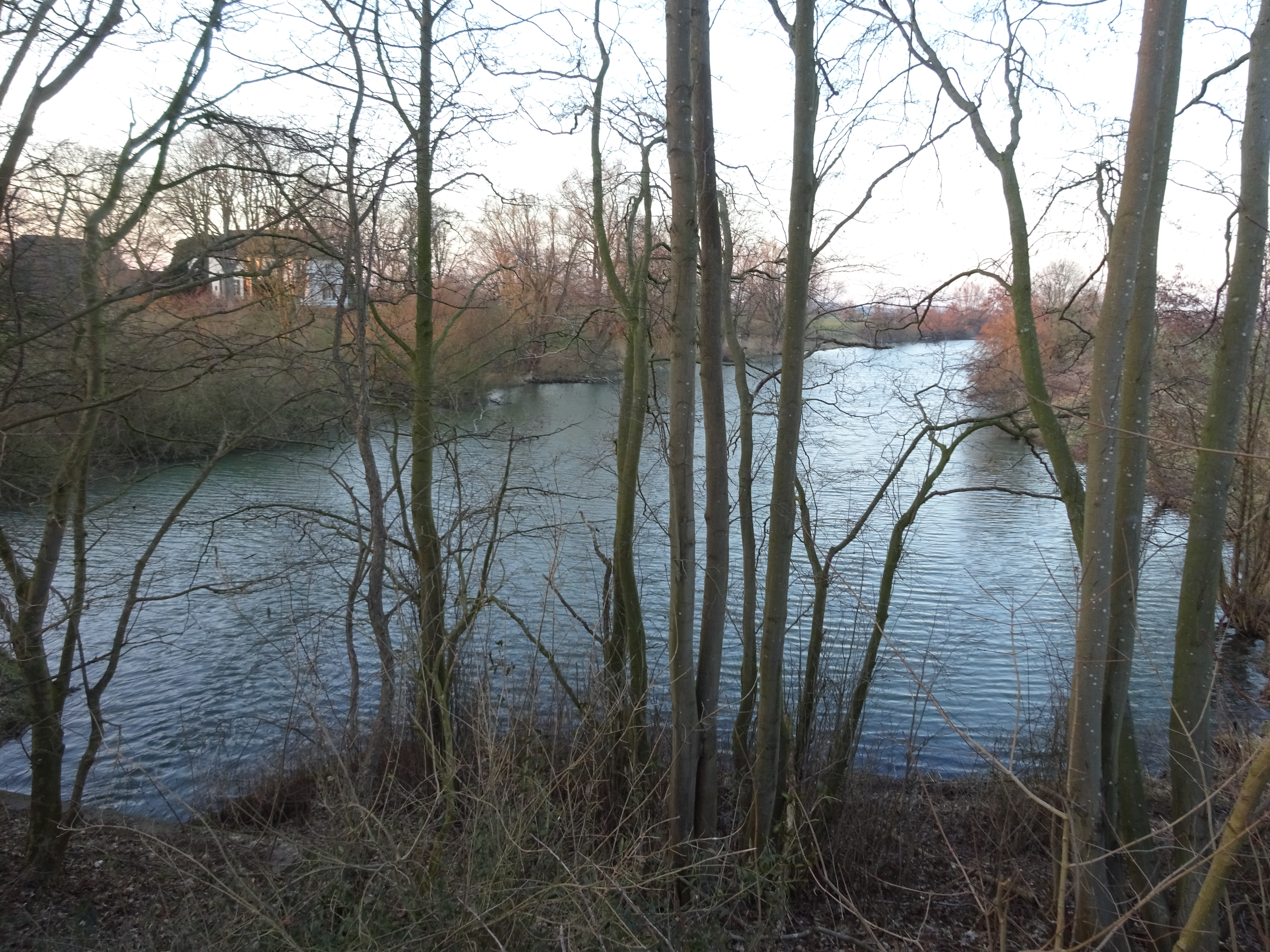 Kellener Altrhein, aan de Emmericher Straße in Kleve-Kellen